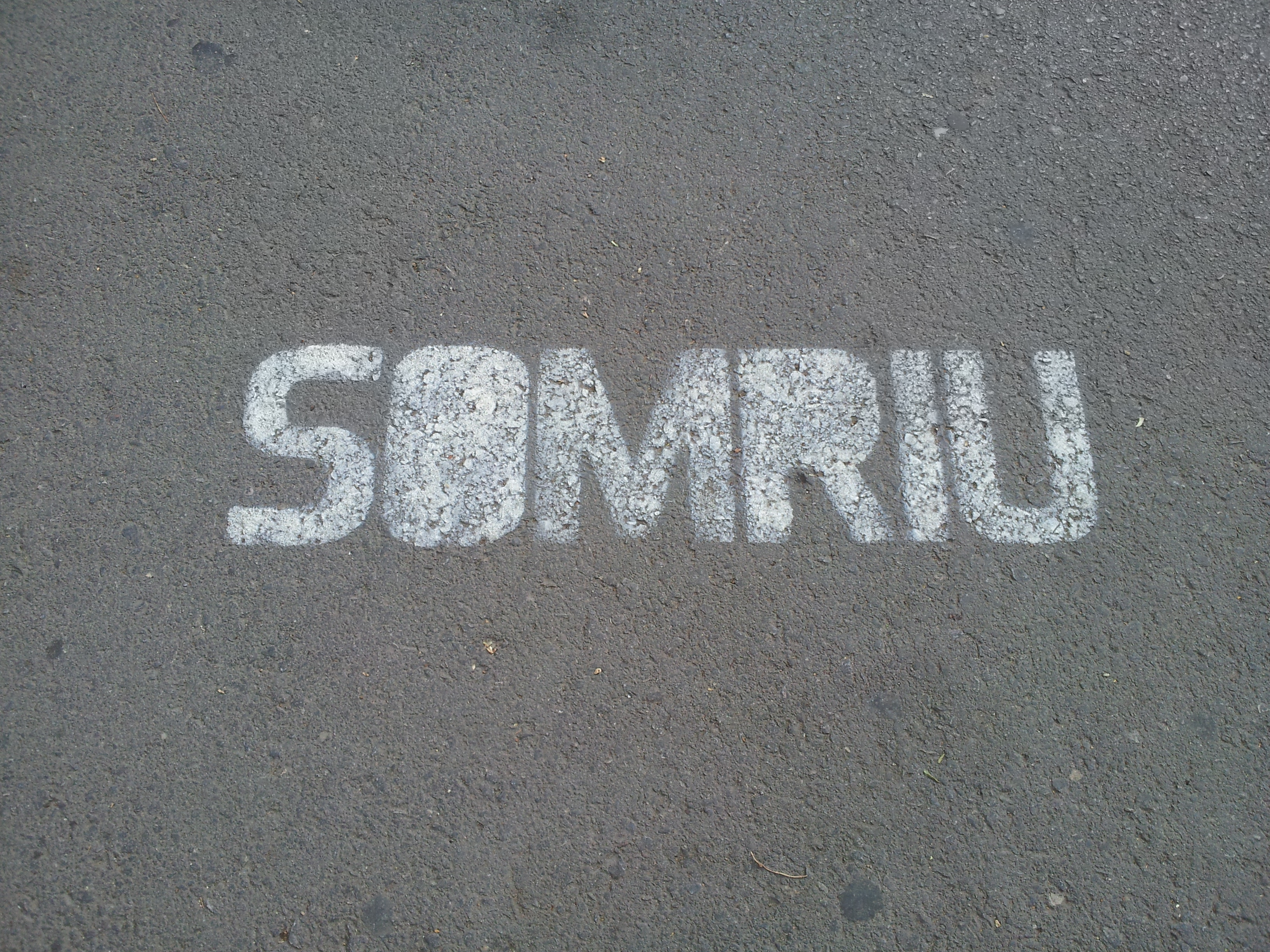 Inscripció de "Te comería a versos" a un pas de vianants entre Daniel Balaciart i Primat Reig.